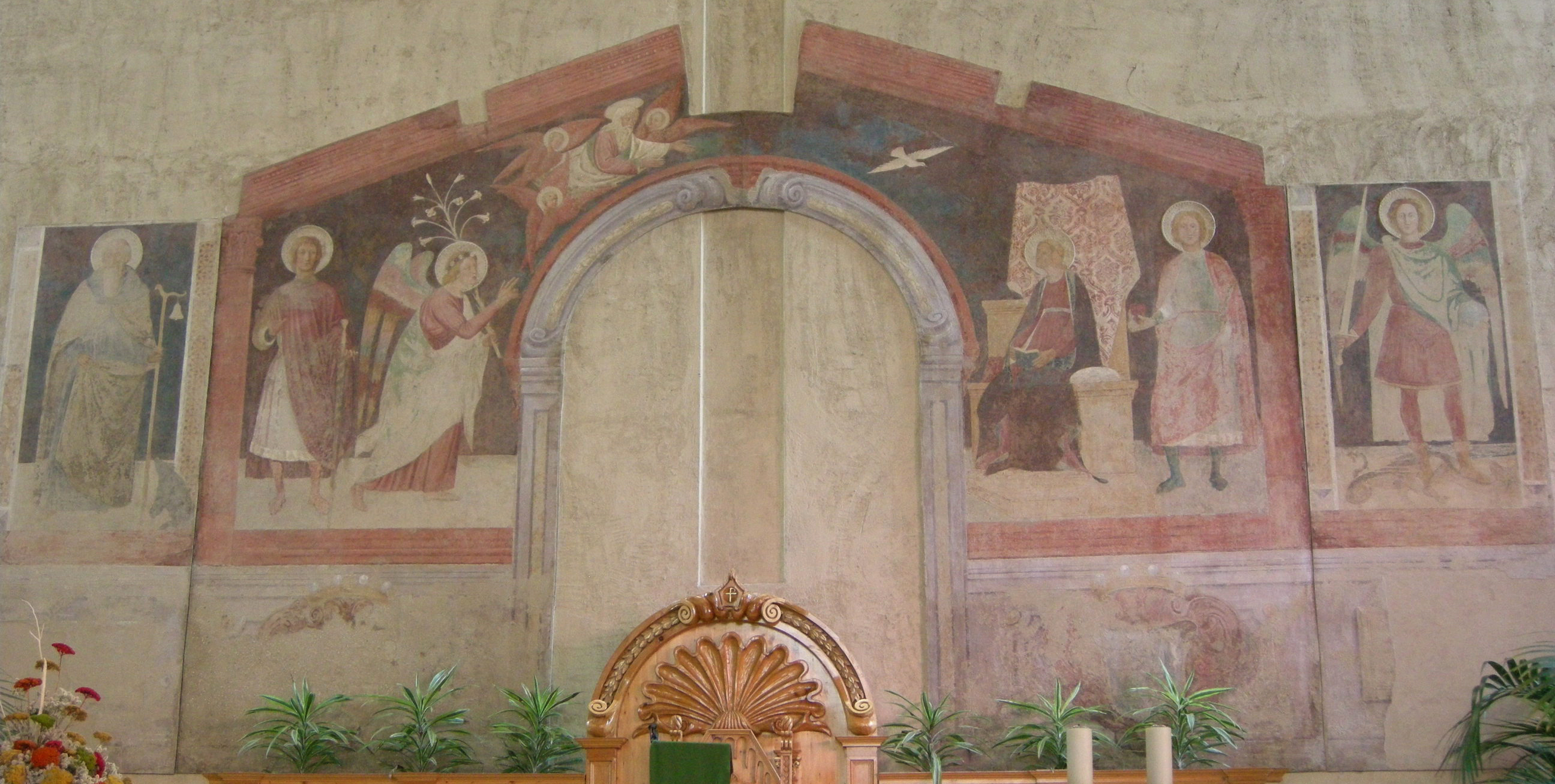 San pio X al Sodo, interno, annunicazione e santi di paolo schiavo (1437) da tabernacolo dell'olmo